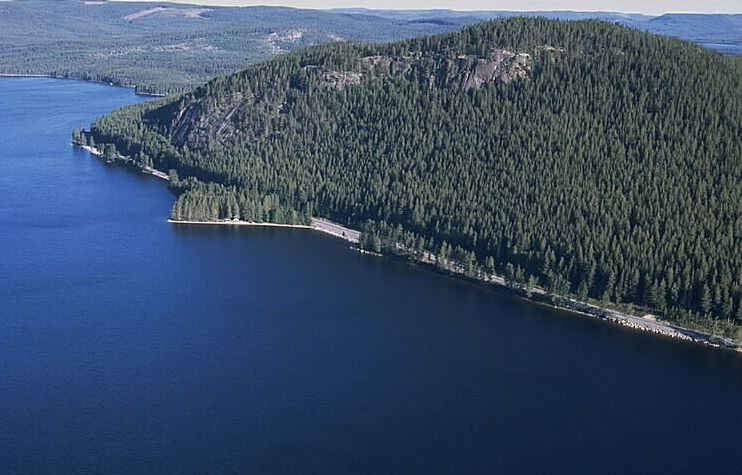 Klevsand Motiv: Idsjön Nyckelord: Flygbilder, Riksintressen Kategori: Insjömiljöer Klevsand.